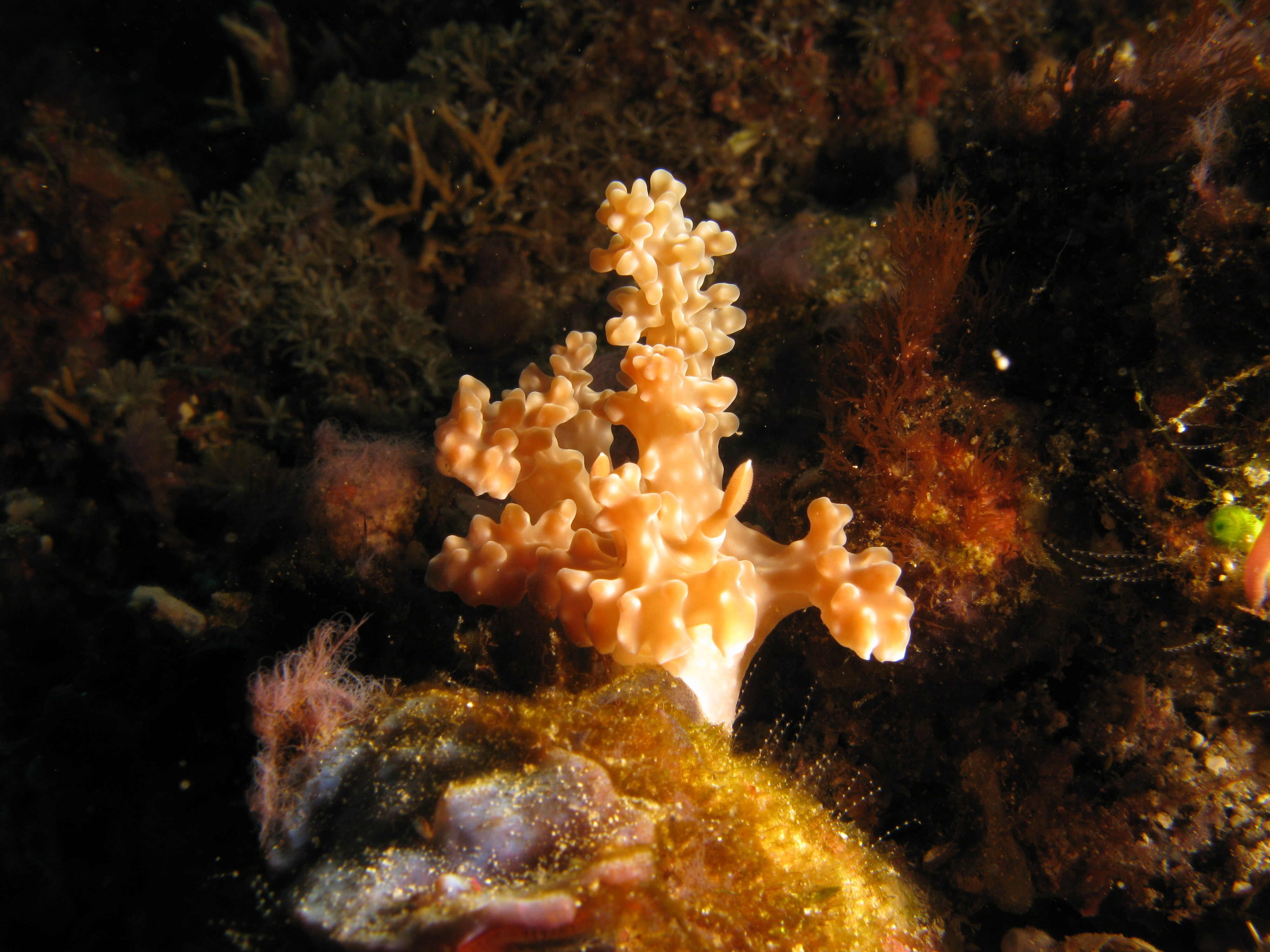 Miamira alleni (sinonimia: Ceratosoma alleni). Dili, Timor Oriental.